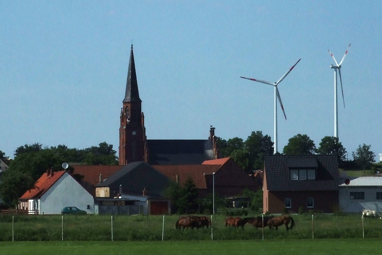 Stüdenitzer Kirche Südseite